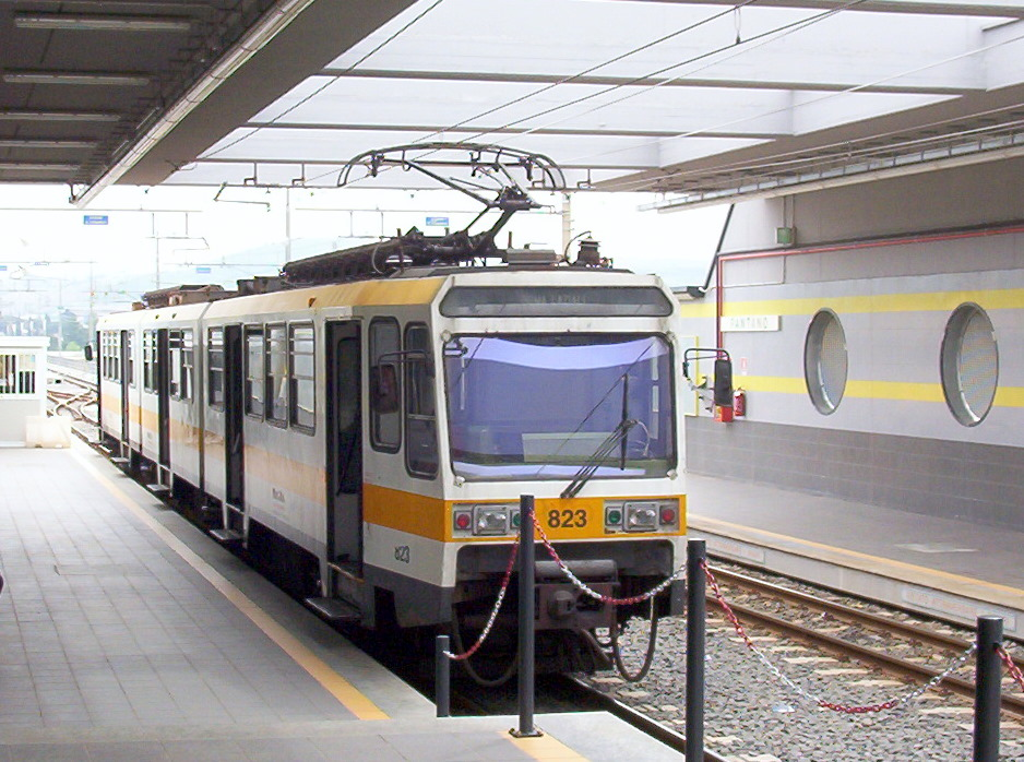 Stazione Pantano